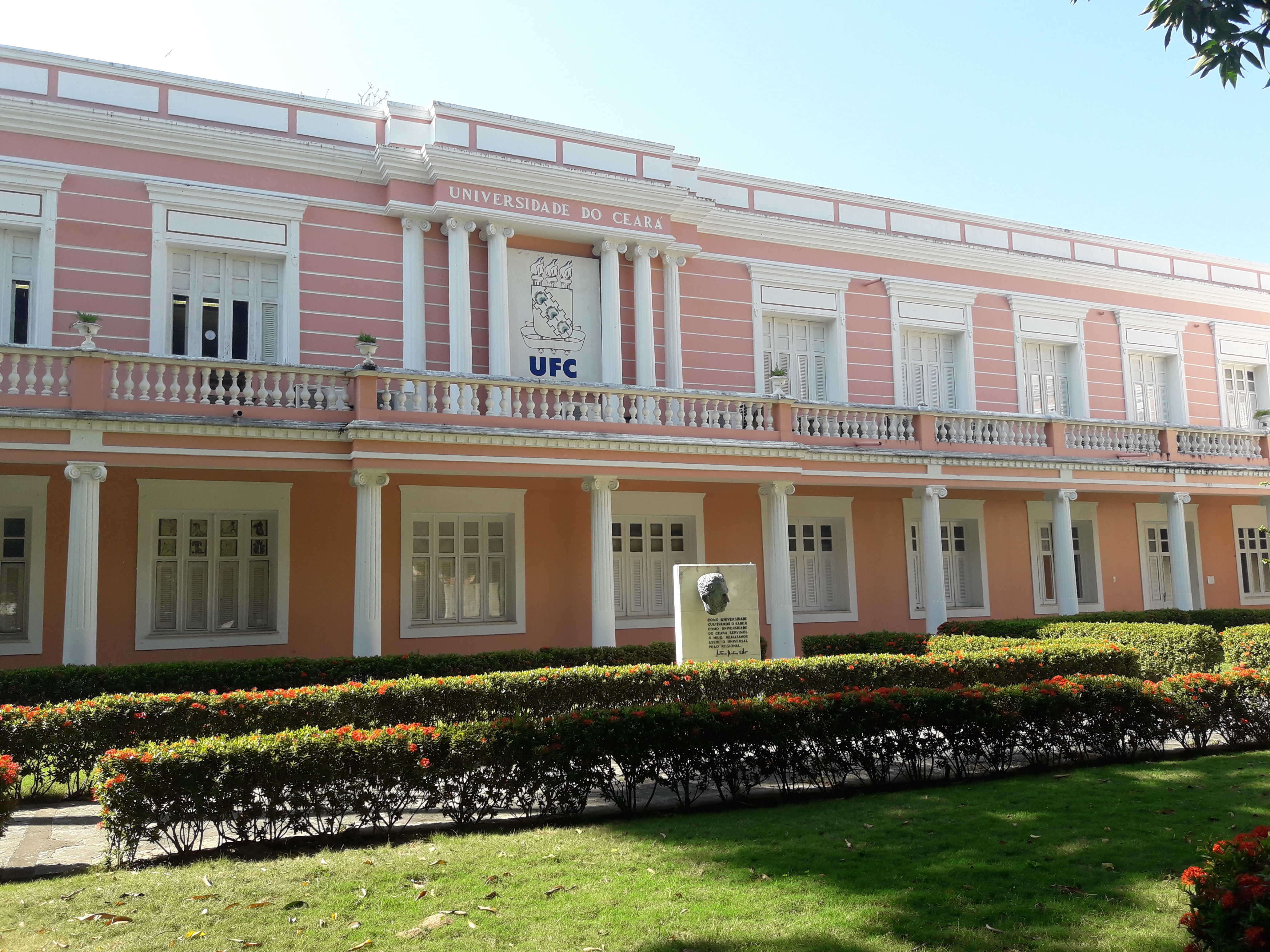 Reitoria da UFC